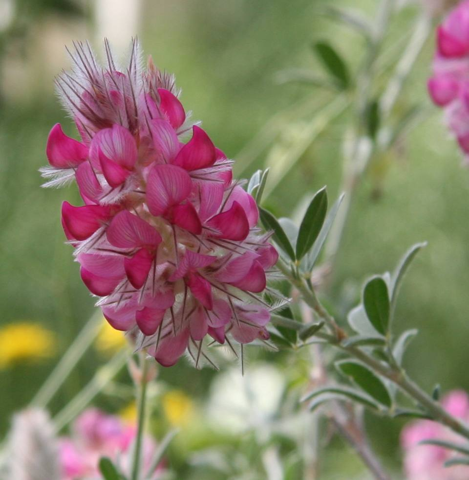 Blüte von Ebenus cretica